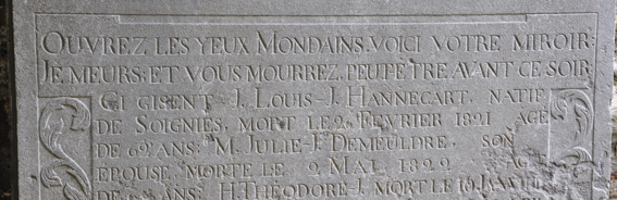 Epitaphe - Vieux cimetière - Soignies